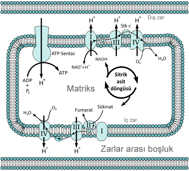 Mitokondriyel elektron taşıma sisteminin şematik diyagramı